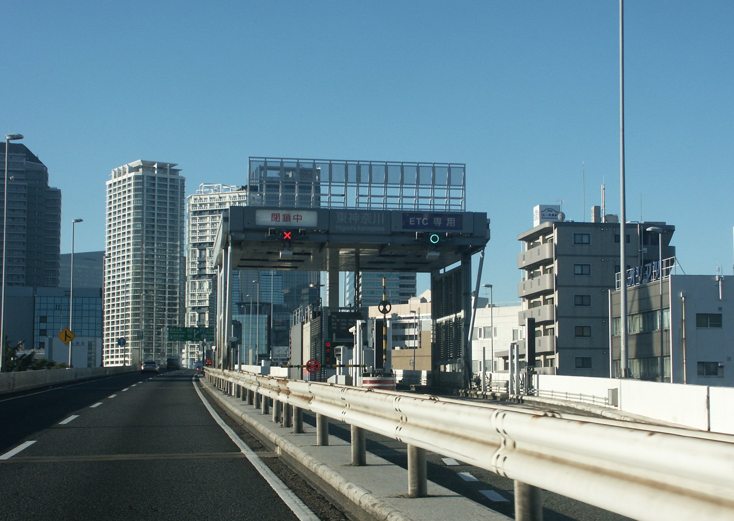 首都高速道路横羽線東神奈川入口料金所（金港JCT方面入口料金所）